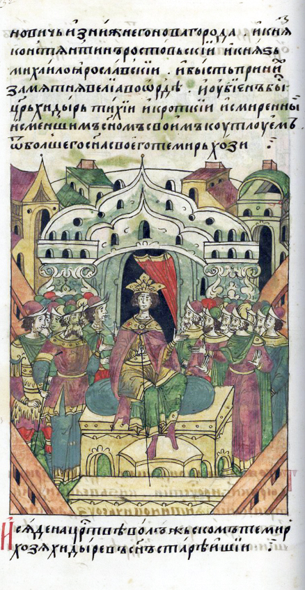 ЛИЦЕВОЙ ЛЕТОПИСНЫЙ СВОД И сел на царство Волжское Темир-Хозя, старший сын Хидыра.